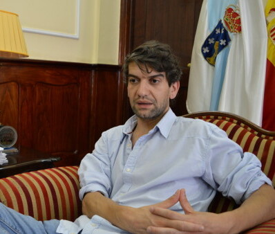 Jorge Suárez, alcalde de Ferrol.